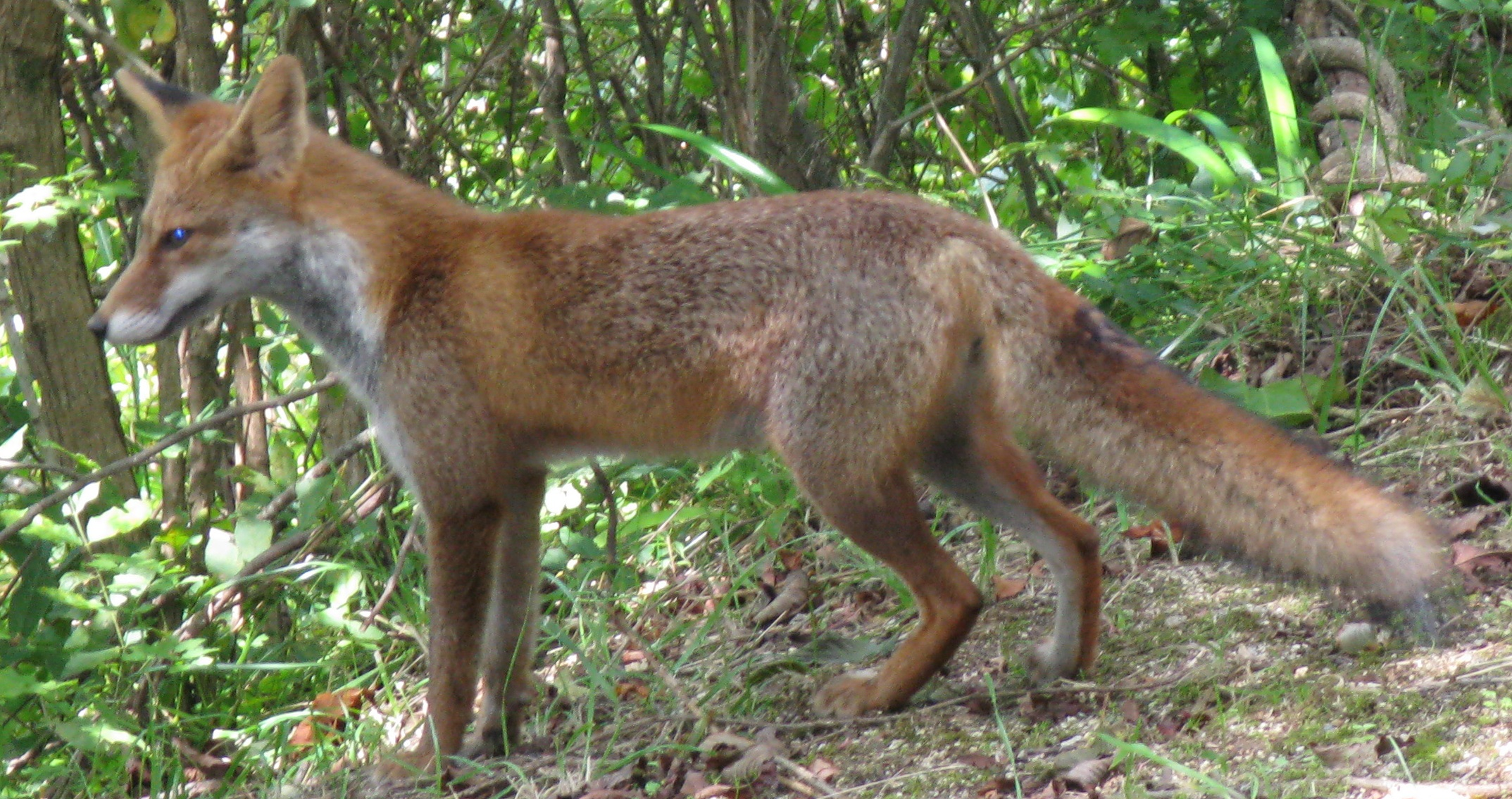 Vulpes vulpes japonica